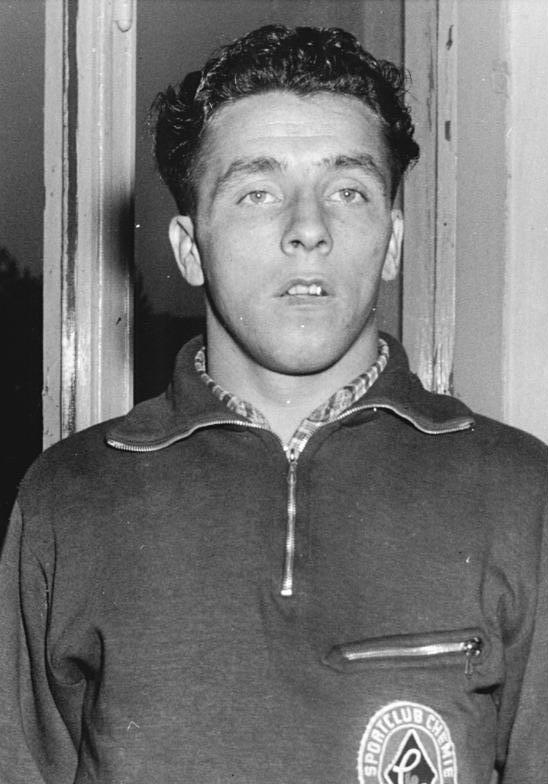 Fred Kämmerer Zentralbild Wendorf Bay-Qu 20.10.1956 Deutsche Olympiateilnehmer im Ringen UBz: Fred Kämmerer (SC Chemie Halle-Leuna) Bantamgewicht.